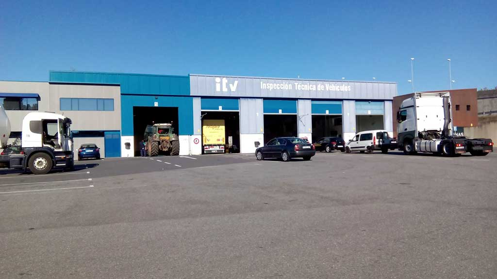 ITV de Espíritu Santo, Cambre.